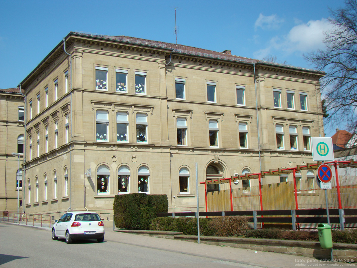 Historisches Gebäude Kaiserstr. 2 in Eppingen